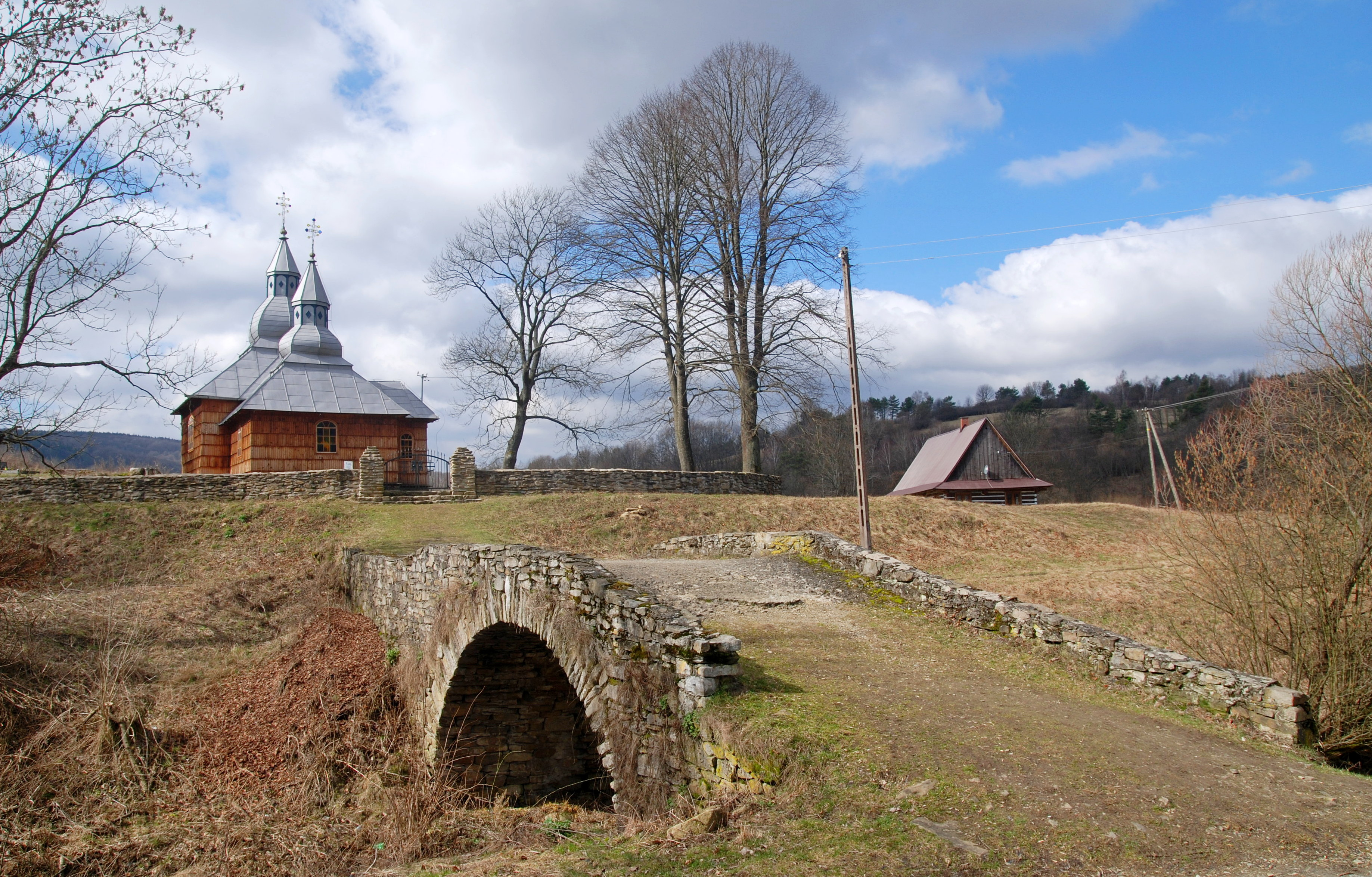 wieś Olchowiec